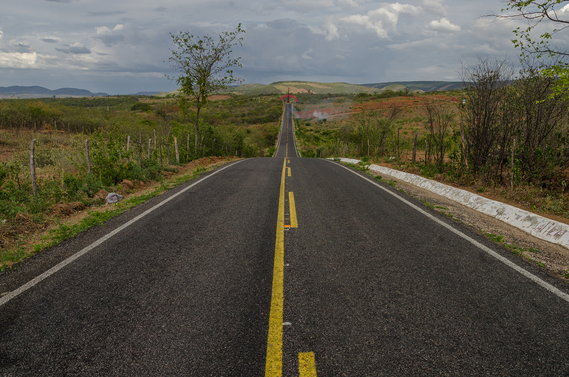 Estrada saindo de venha ver